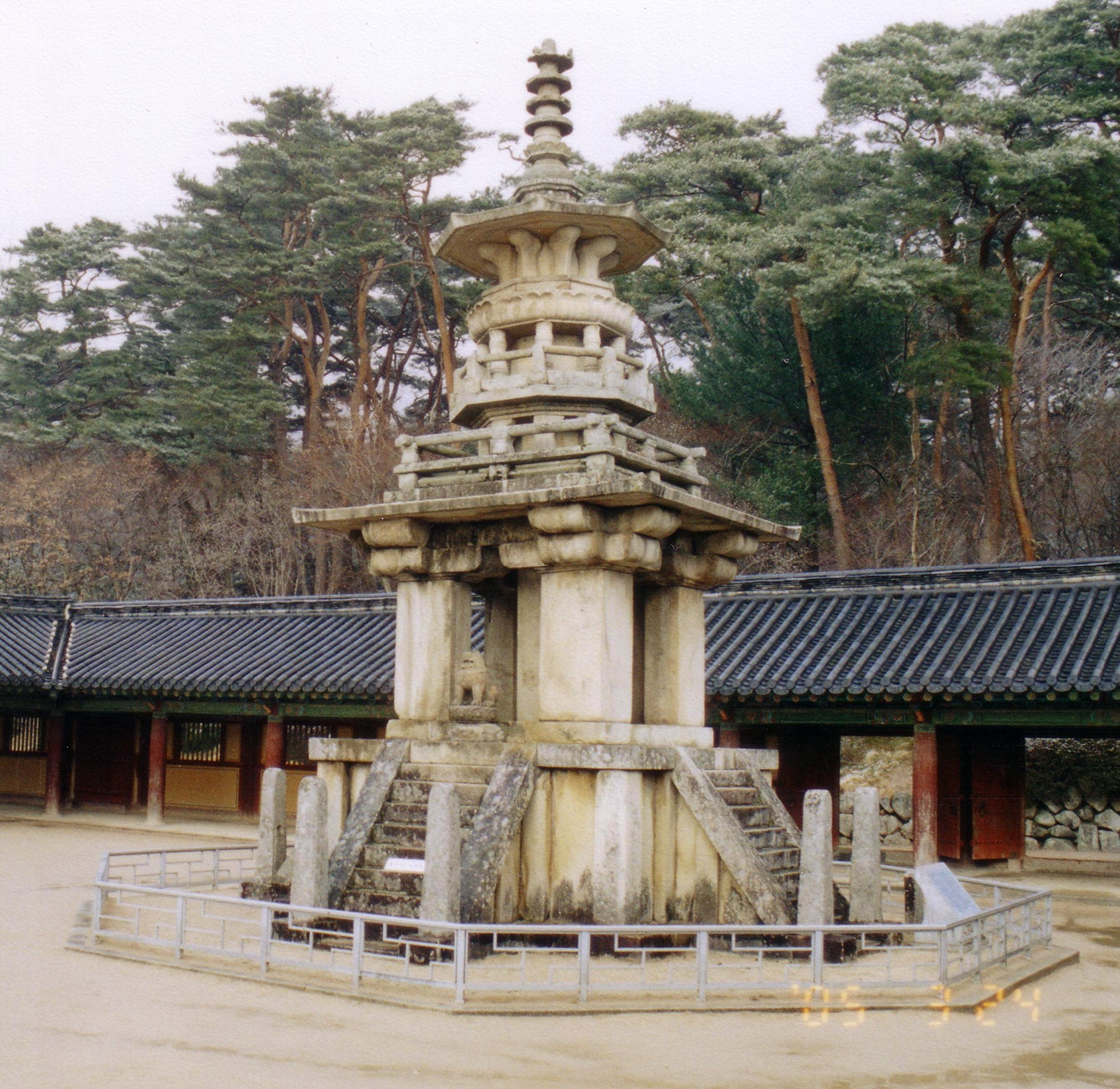 Dabotap Pagode im Bulguksa Tempel